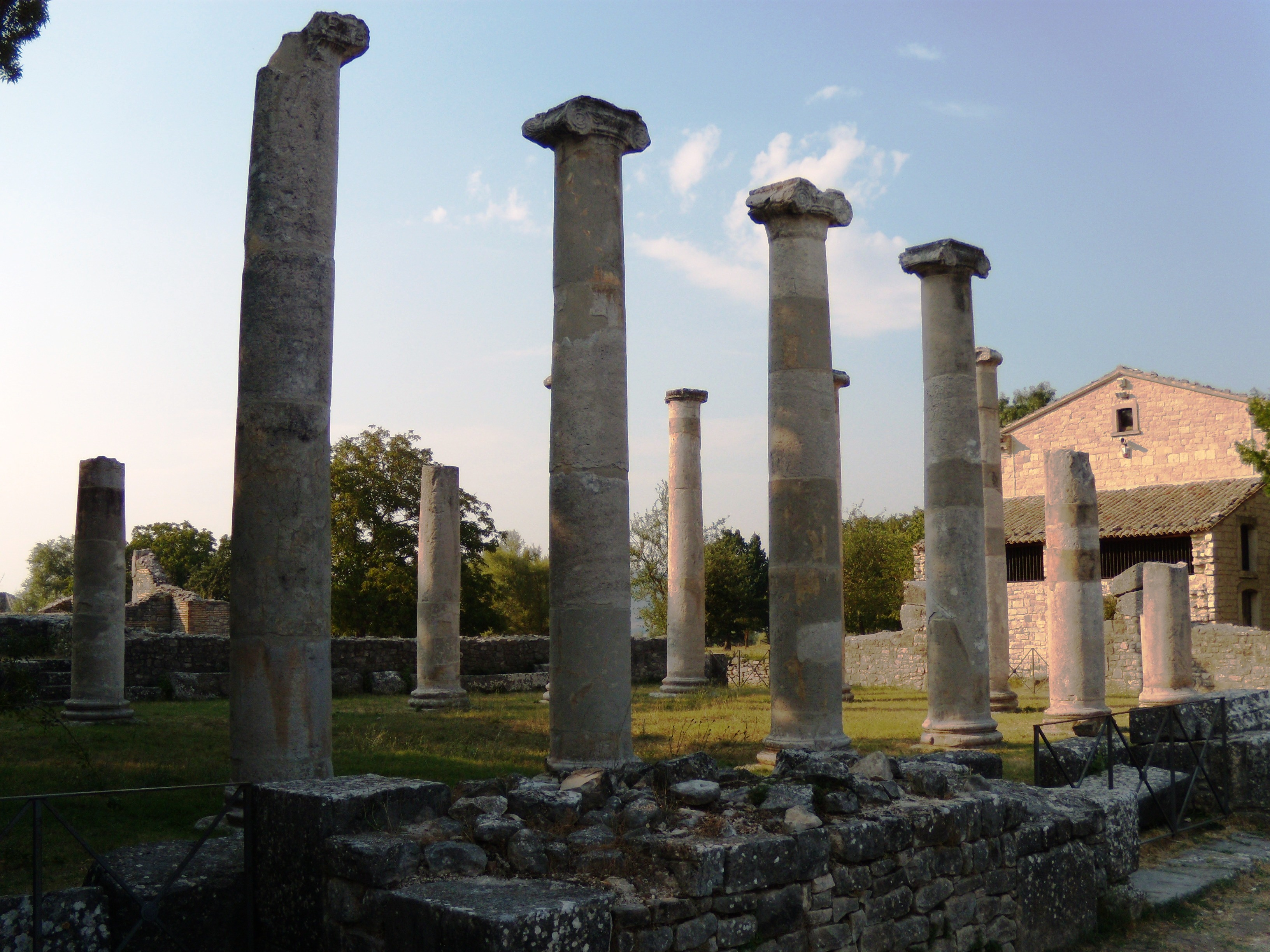 Scavi archeologici di Saepinum (Italy): i resti della Basilica di epoca romana.